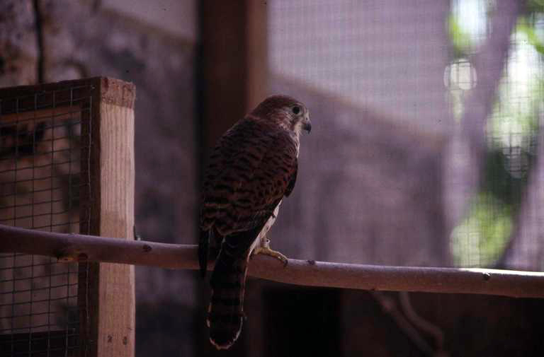 Mauritius kestrel in release cage on Ile aux Aigrettes, Mauritius, awaiting reintroduction.